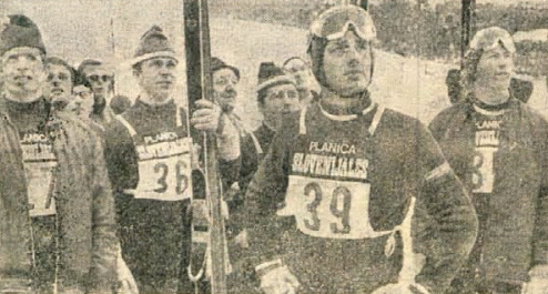 Z leve: Ludvik Zajc, Zdenek Hubač, Peter Štefančič in Marjan Mesec.